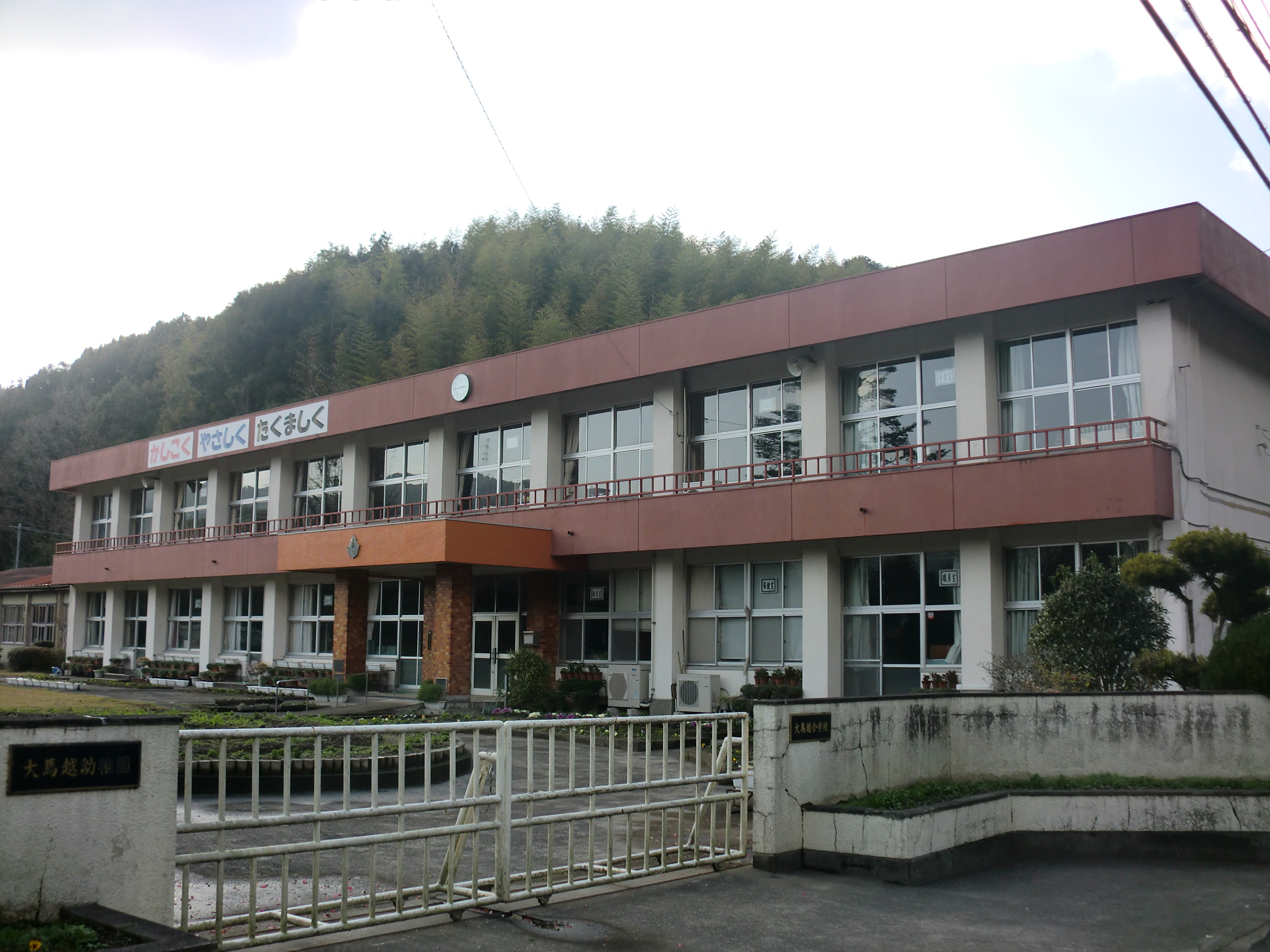 薩摩川内市にある大馬越（おおまごえ）小学校